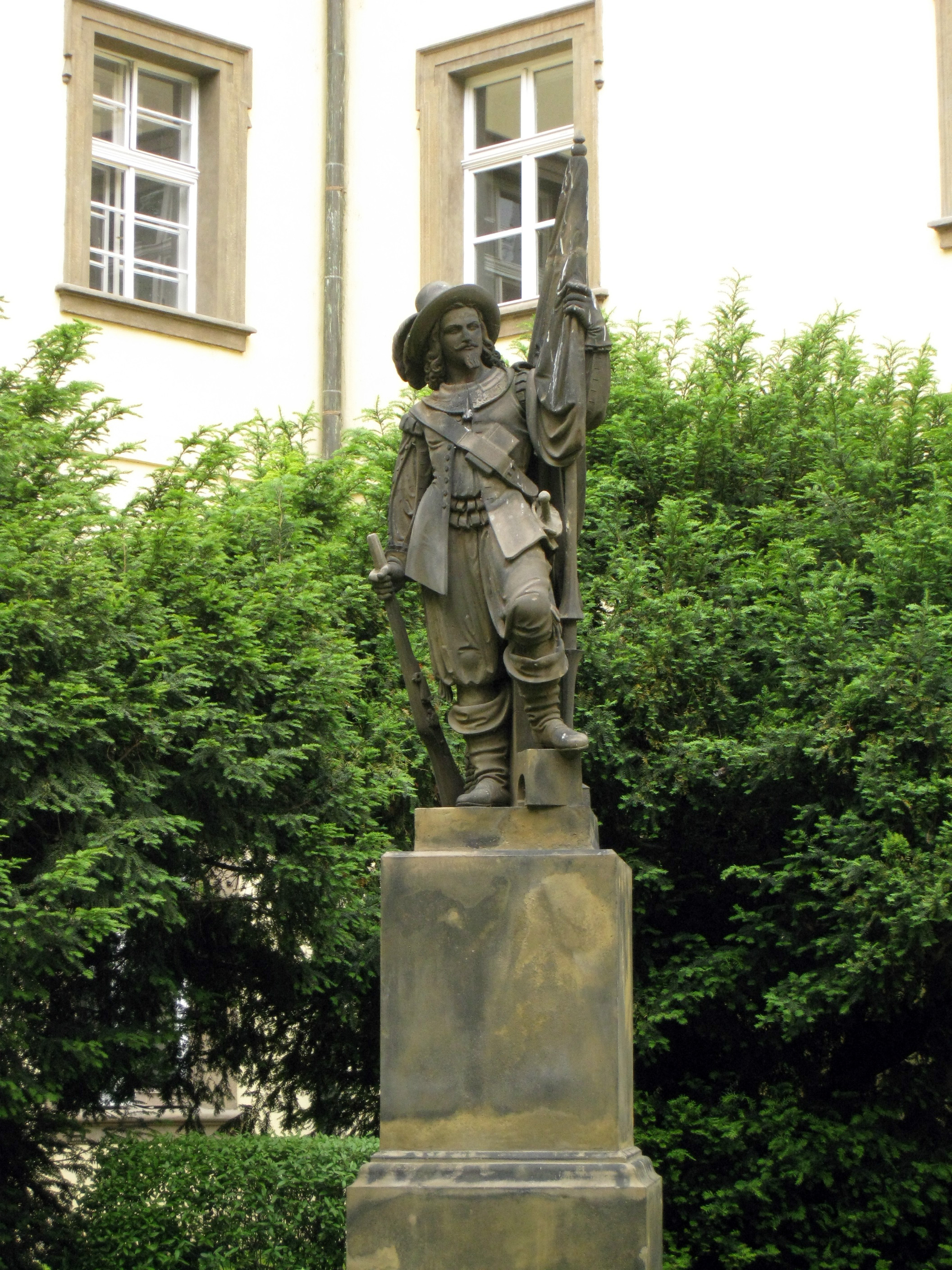 Kolej Klementinum (Staré Město), Praha 1, Křižovnické nám., Karlova 190, Staré Město. Socha pražského studenta